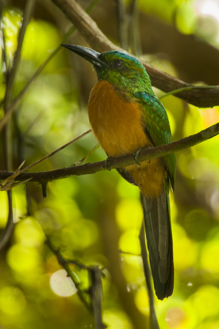 Great Jacamar - Panama_H8O2675